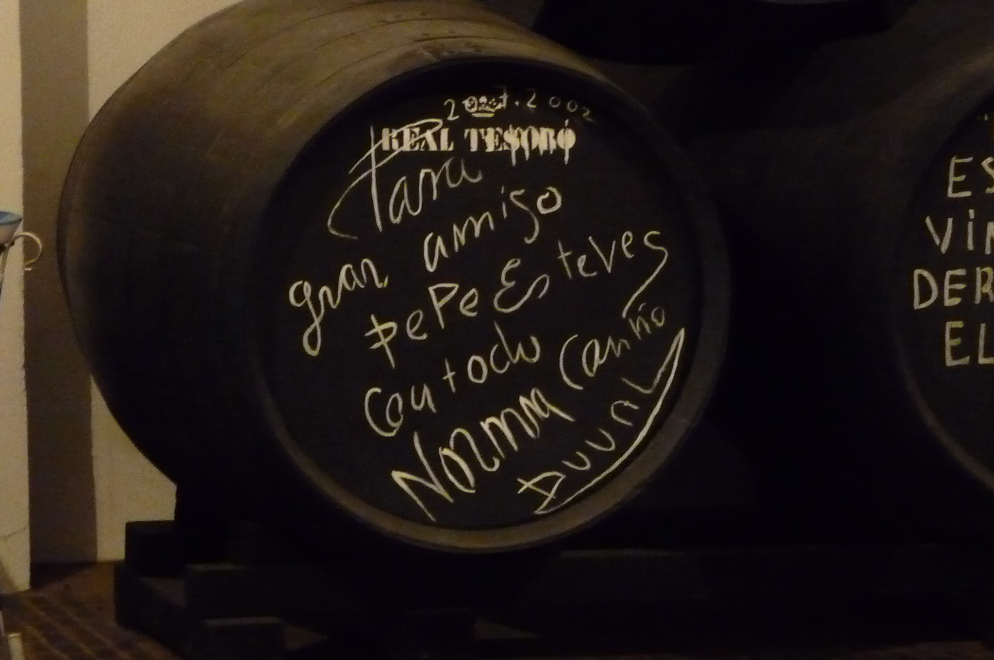 Norma-Duval-p1000033.jpg